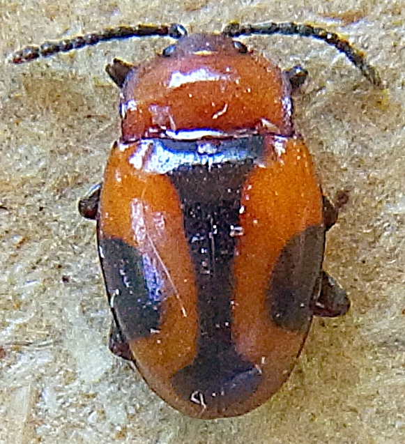 Mycetina cruciata aus Ostungarn, Zemplen-Bergland auf Baumpilz am 16. Juli 2015